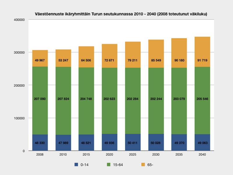 Väestöennuste ikäryhmittäin Turun seutukunnassa 2010–2040